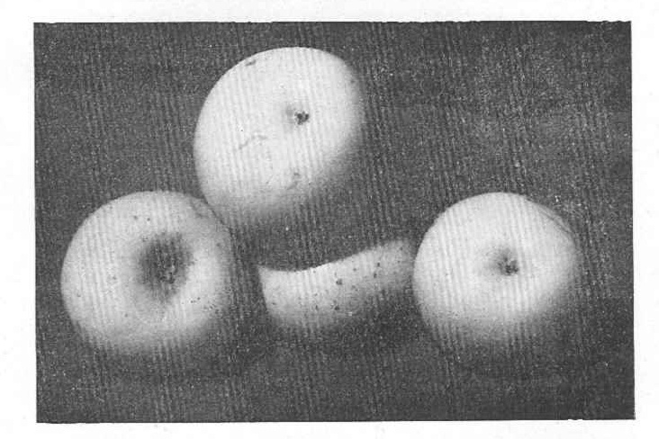 Pomme "Coquette" ou "Blanc d'Espagne".